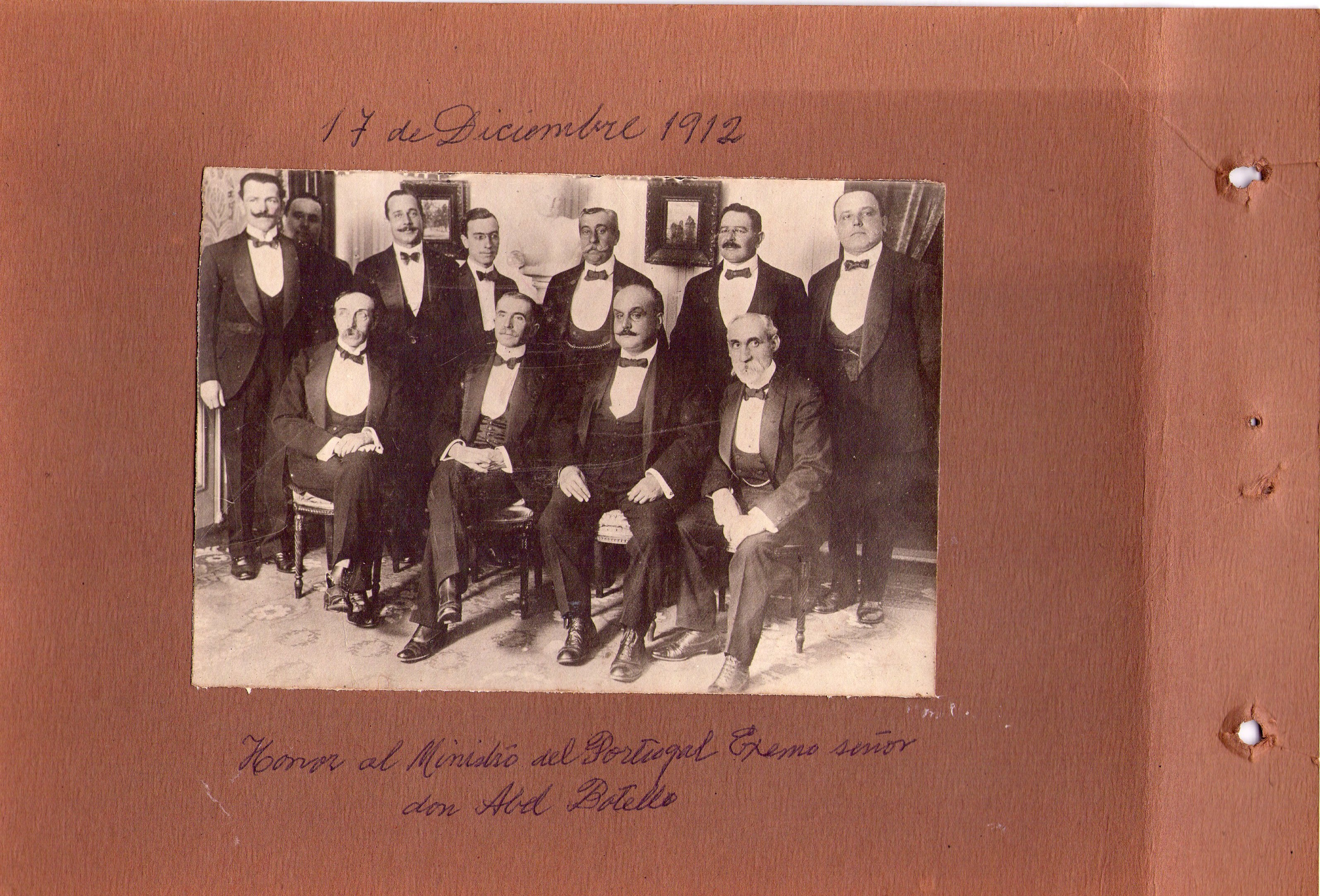 Abel Bothelo en Valparaíso , Chile . Cena en honor brindada por el Vice Cónsul de Brasil , el también portugues Alfredo Gusmao da Silva Barreto Perkins (Alfredo Barreto Perkins en Chile) , el 17 de Diciembre de 1912